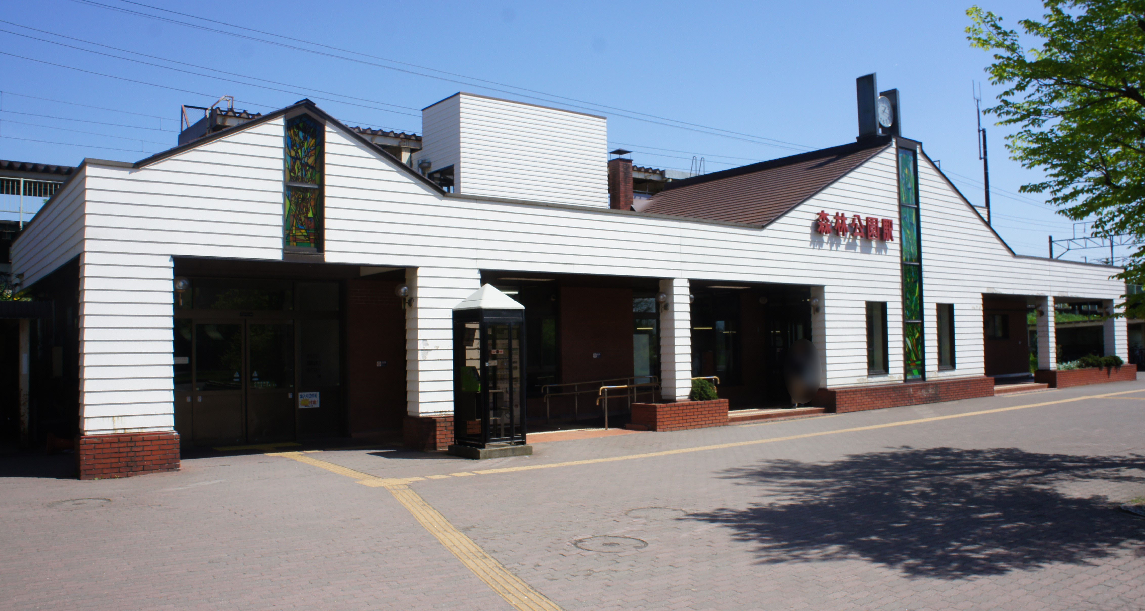 JR函館本線・森林公園駅の西口駅舎